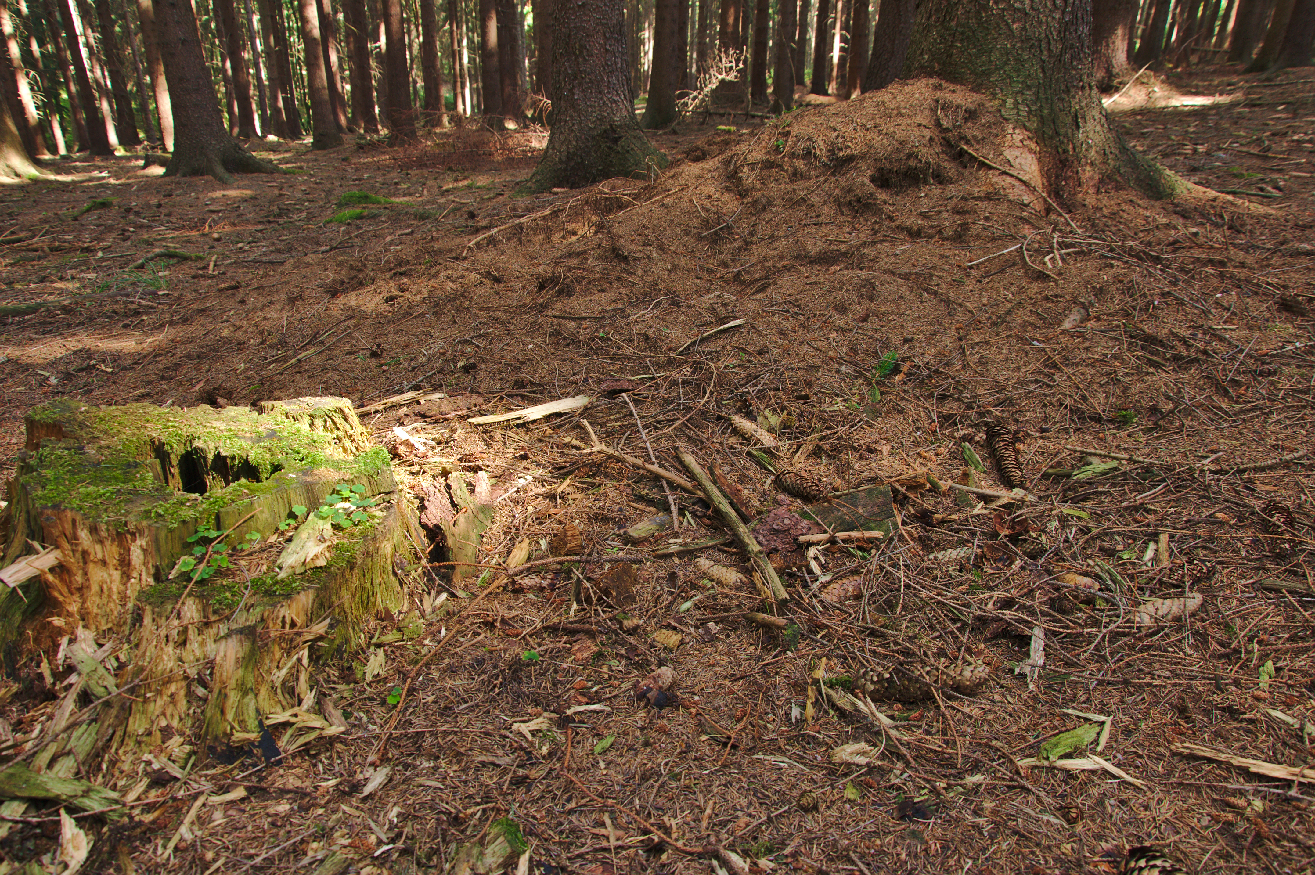 Přírodní památka Studený kout, okres Prostějov